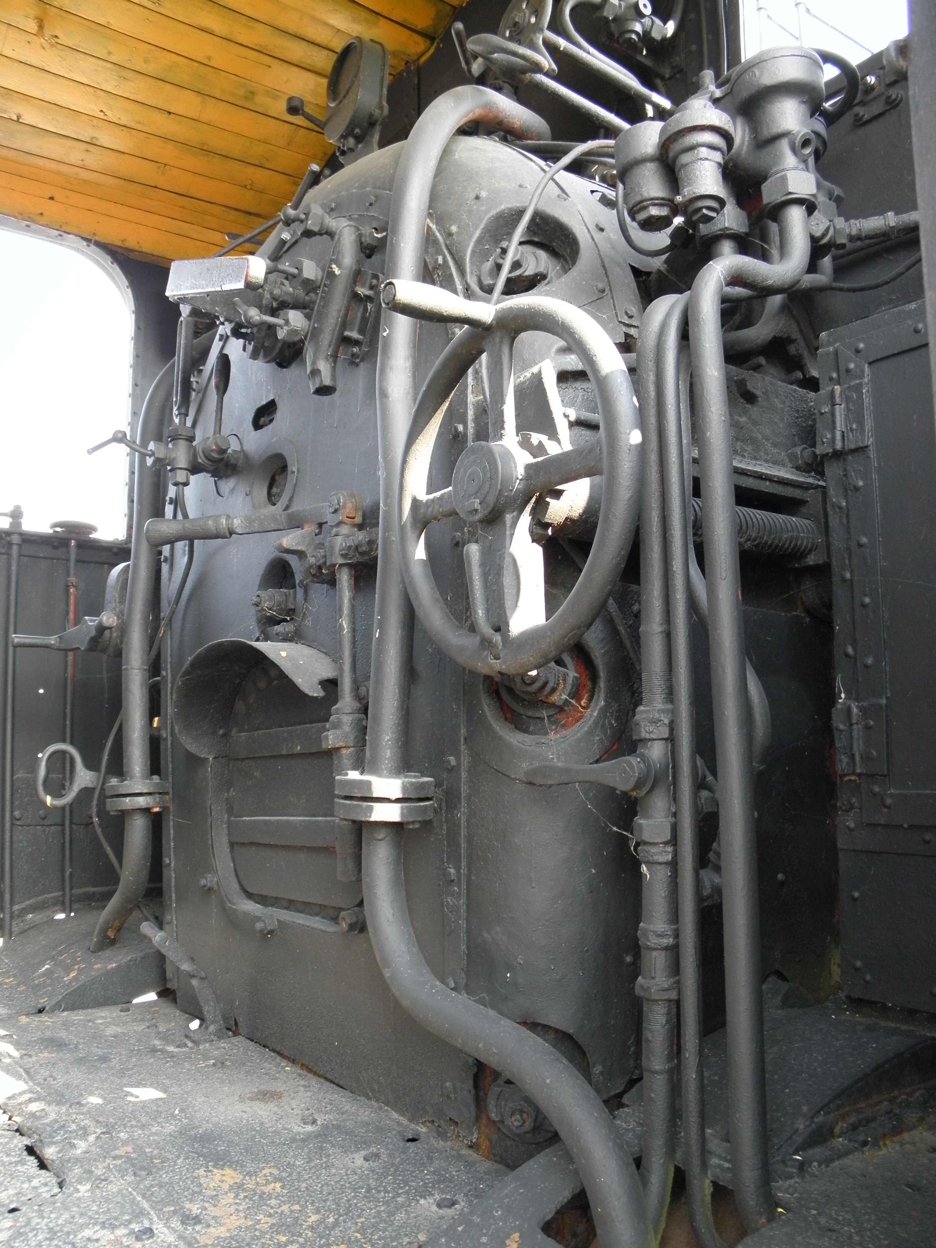 Campo San Martino, centro commerciale "La Locomotiva": la locotender FS 835.291 monumentata nel piazzale del centro commerciale.